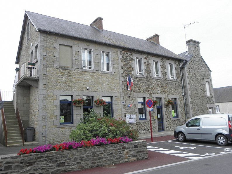 Mairie de Beauvoir (50).